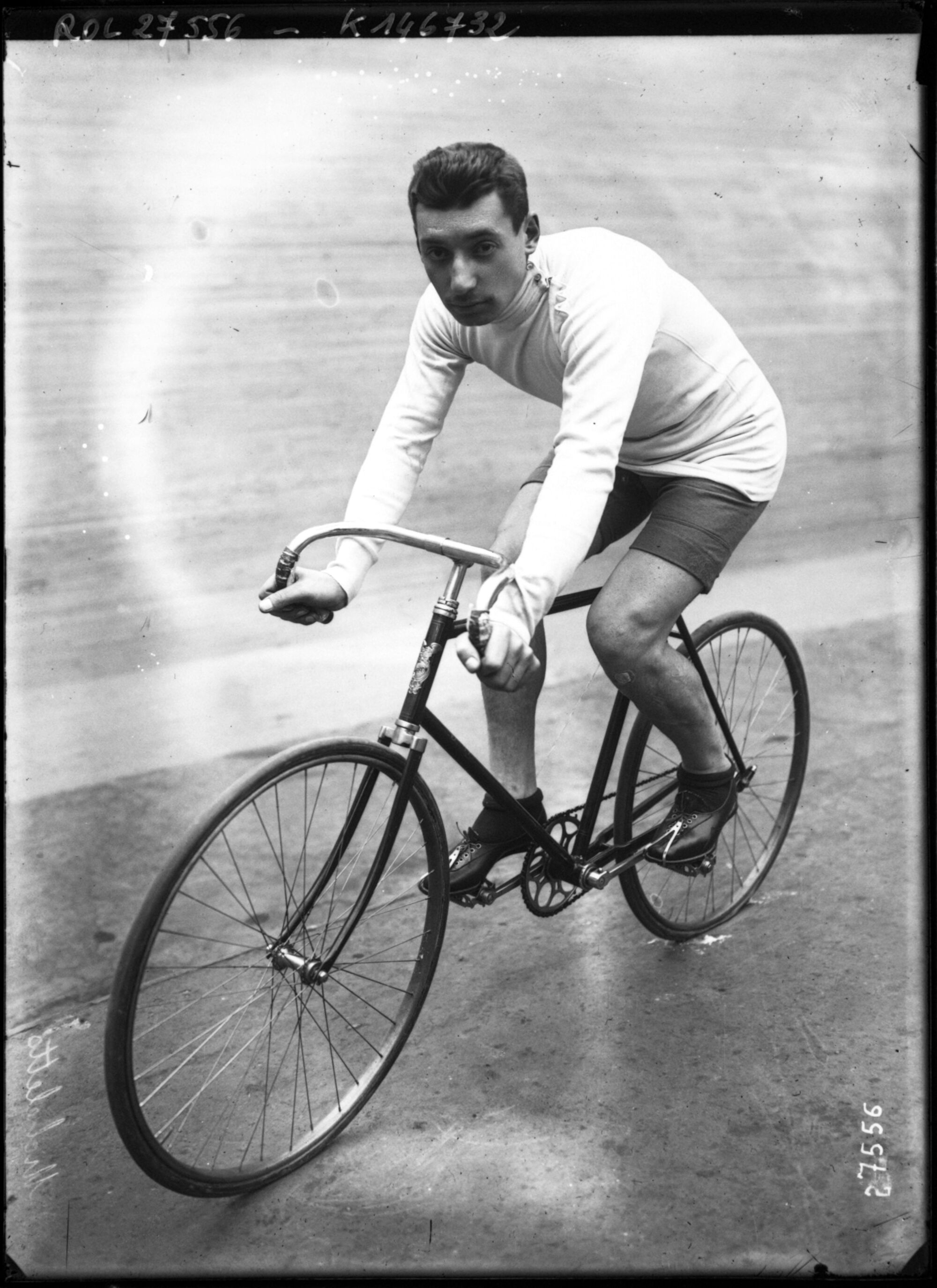 Giovanni Micheletto portrait du coureur cycliste avant le départ